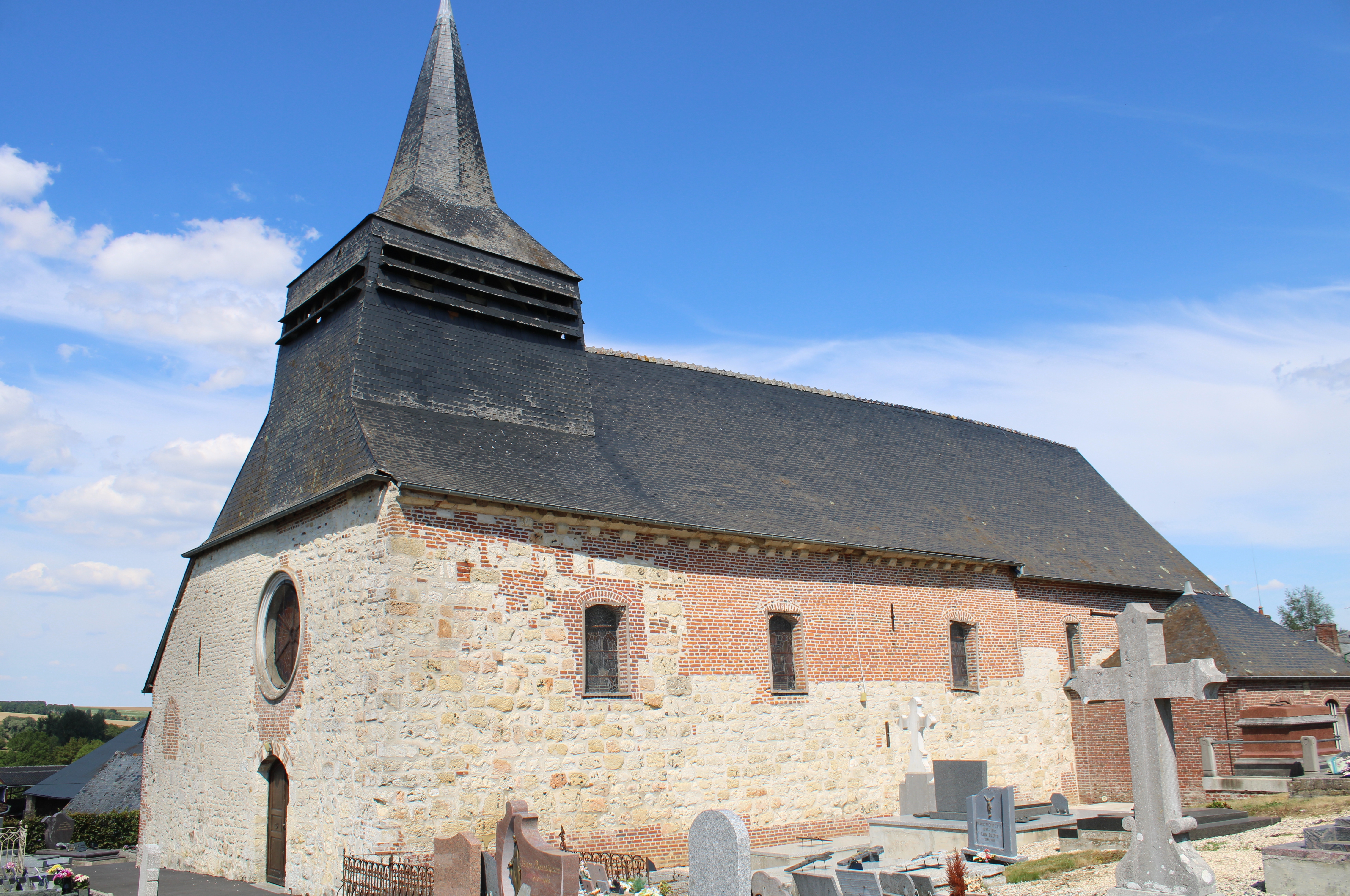 L'église.